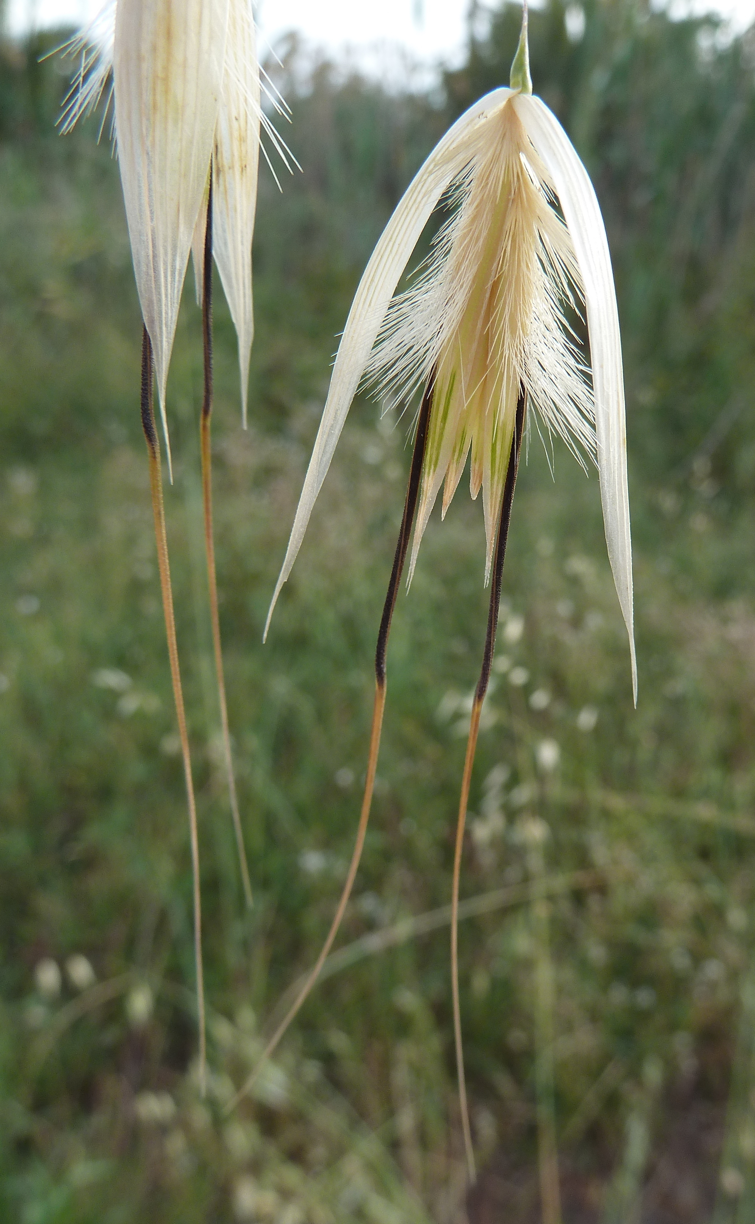 Avena fatua (Ballueca, Avena loca, ...) : Espiguilla, detalle - La Huerta, Albatera (Alicante, España).